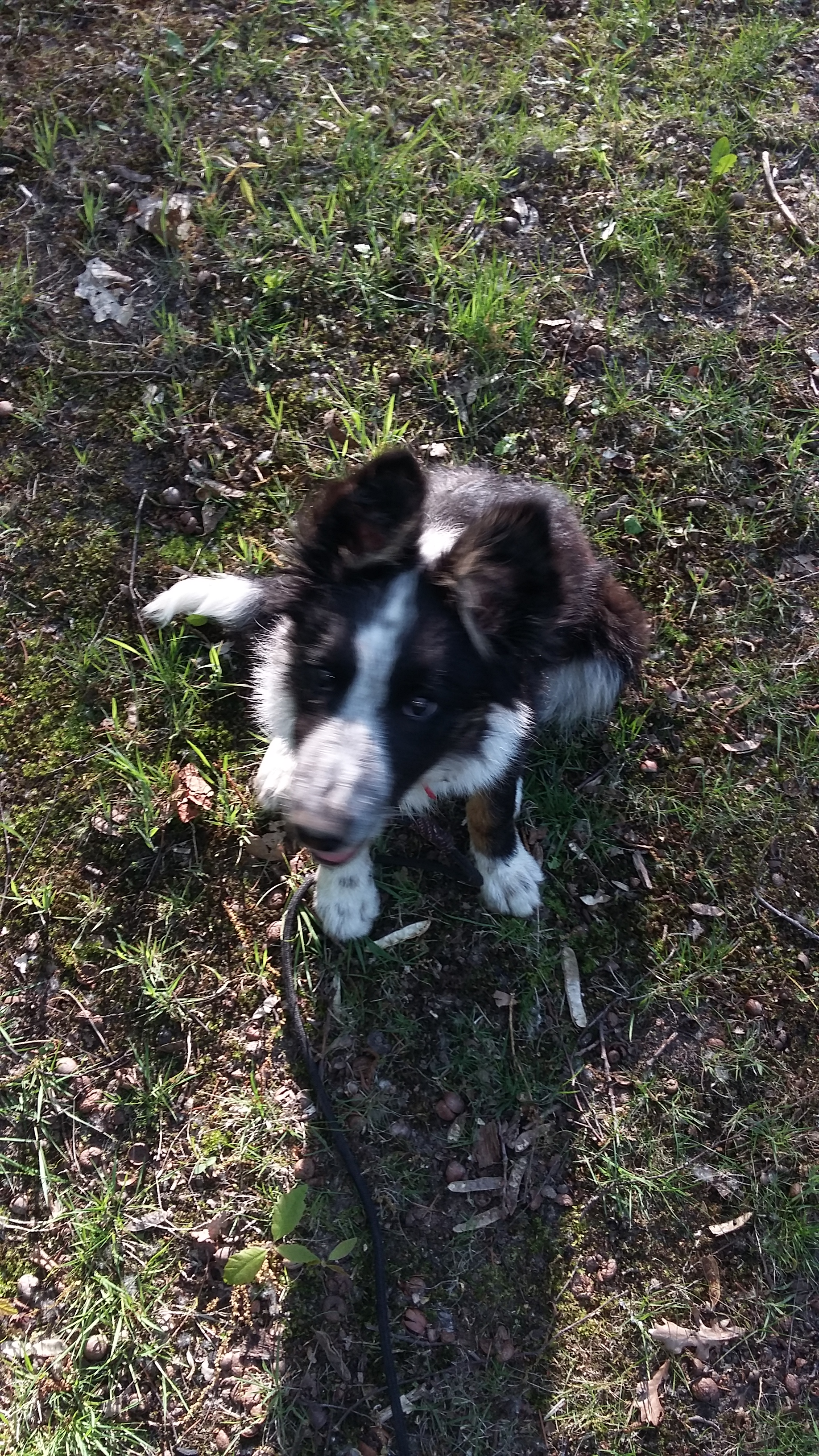 Pięciomiesięczny szczeniak